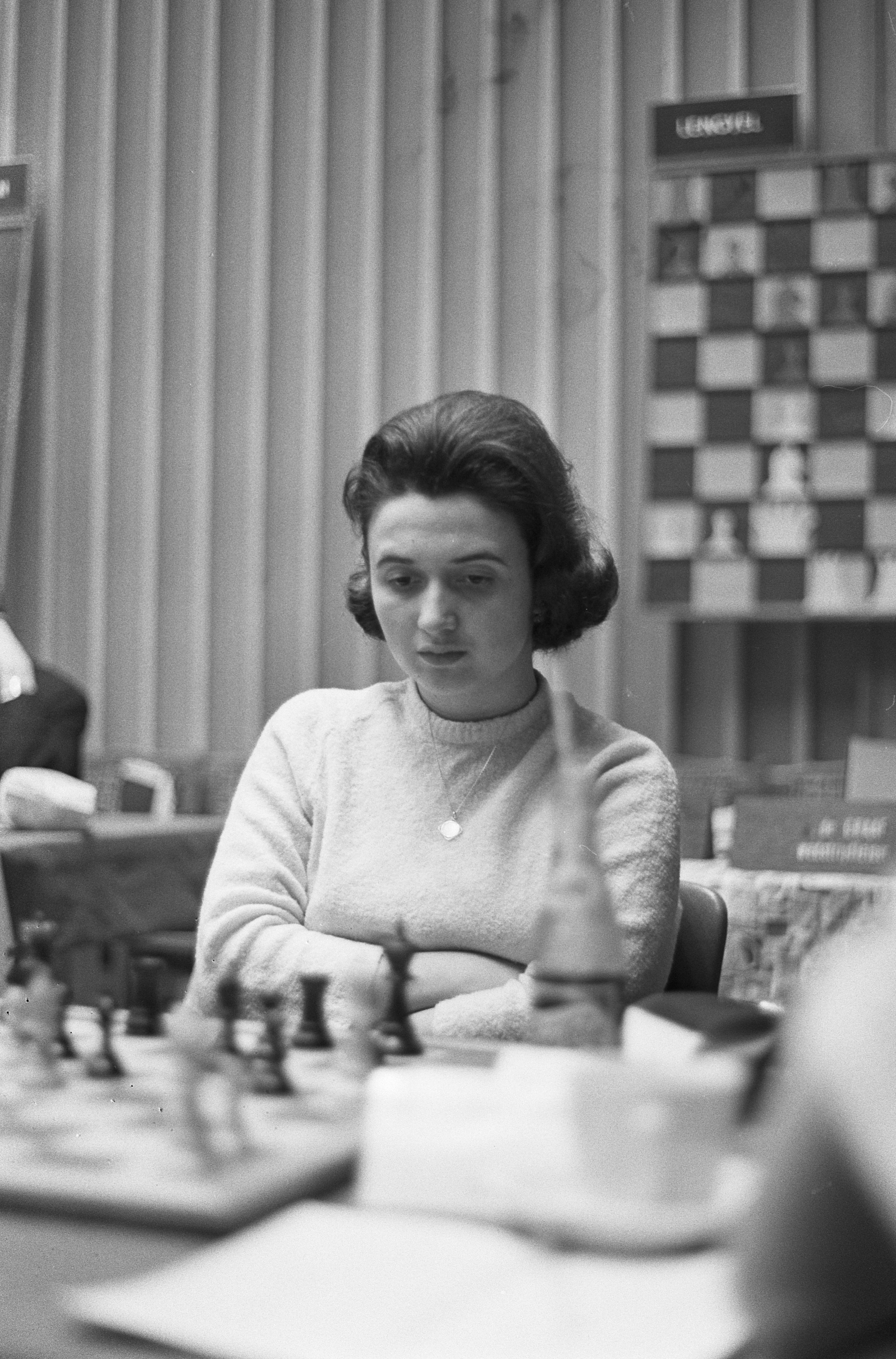 Collectie / Archief : Fotocollectie Anefo Reportage / Serie : [ onbekend ] Beschrijving : Hoogovenschaaktoernooi, de beste dame onder de schaakster was mejuffrouw Katja Jovanovic (Joegoslavie) Datum : 24 januari 1965 Trefwoorden : schaken Instellingsnaam : Hoogovenschaaktournooi Fotograaf : Gelderen, Hugo van / Anefo Auteursrechthebbende : Nationaal Archief Materiaalsoort : Negatief (zwart/wit) Nummer archiefinventaris : bekijk toegang 2.24.01.05 Bestanddeelnummer : 917-3681